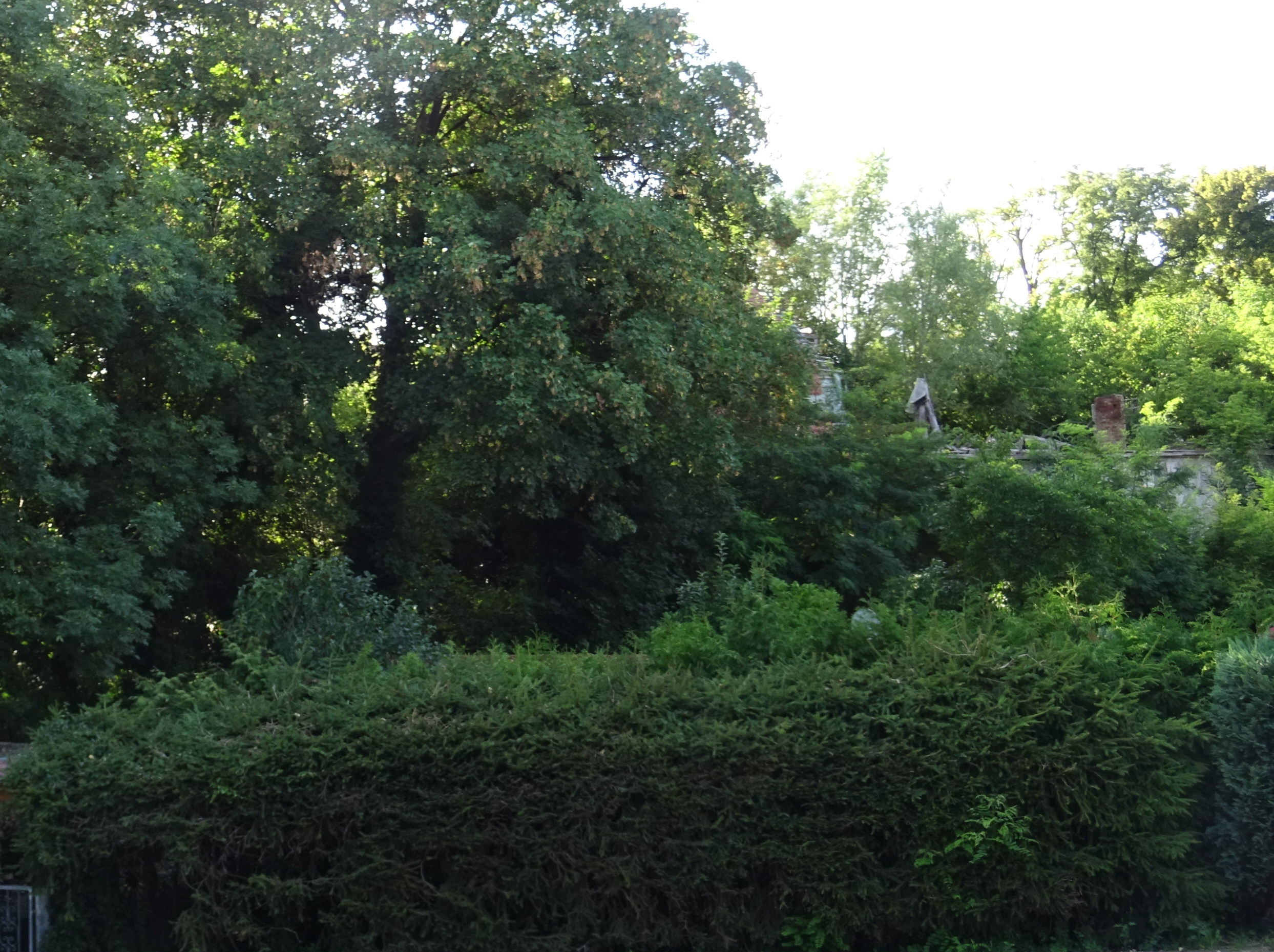 Hohennauen, Ruine Gutshaus